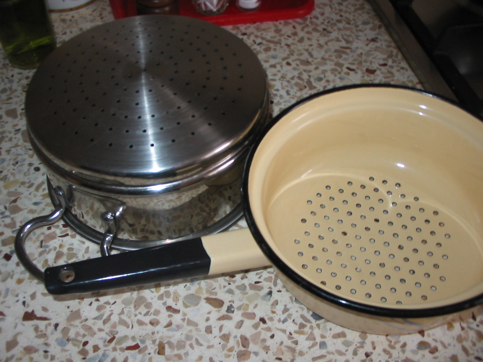 Друшляк